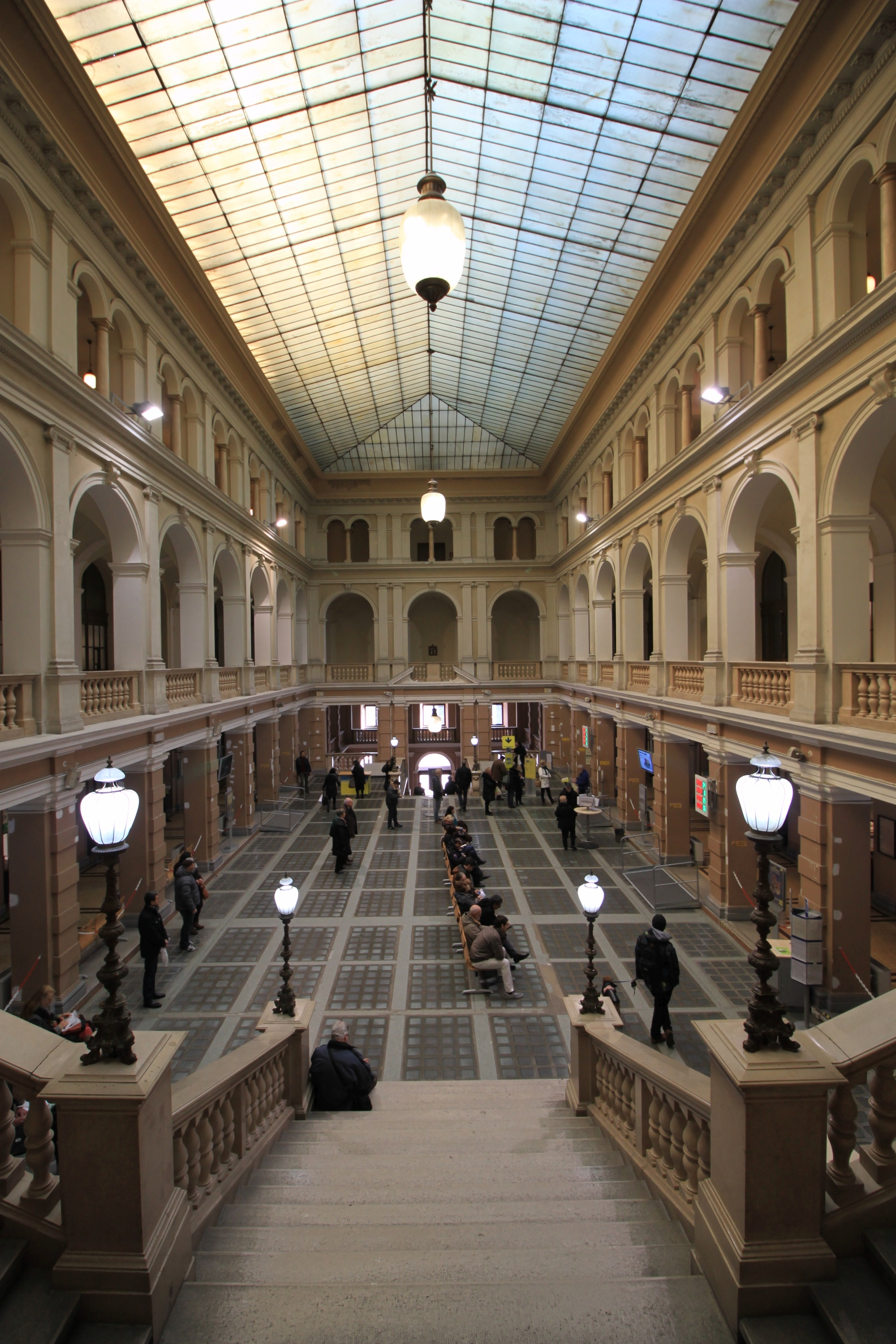 Palazzo delle Poste, Piazza Vittorio Veneto, Trieste; Interiore